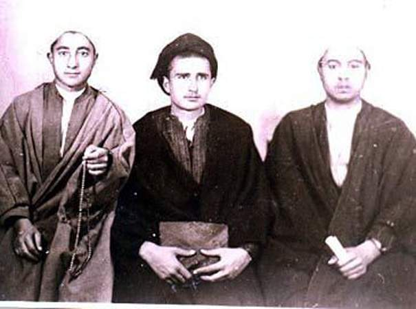 امام خمینی در نوجوانی. فردی که در وسط نشسته است.